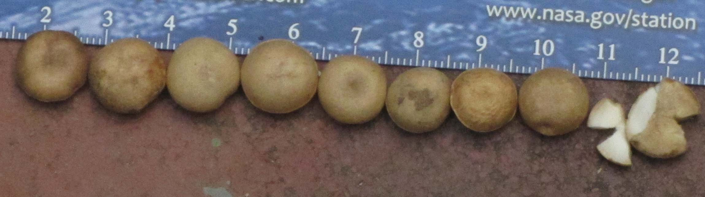 தேத்தாங்கொட்டை. நீரை மென்மையாக்கும். தெளிய வைக்கும். நுரைக்கும். நகையிலுள்ள அழுக்குகளைப் போக்கப் பயன்படுத்துவர். எனது படம்